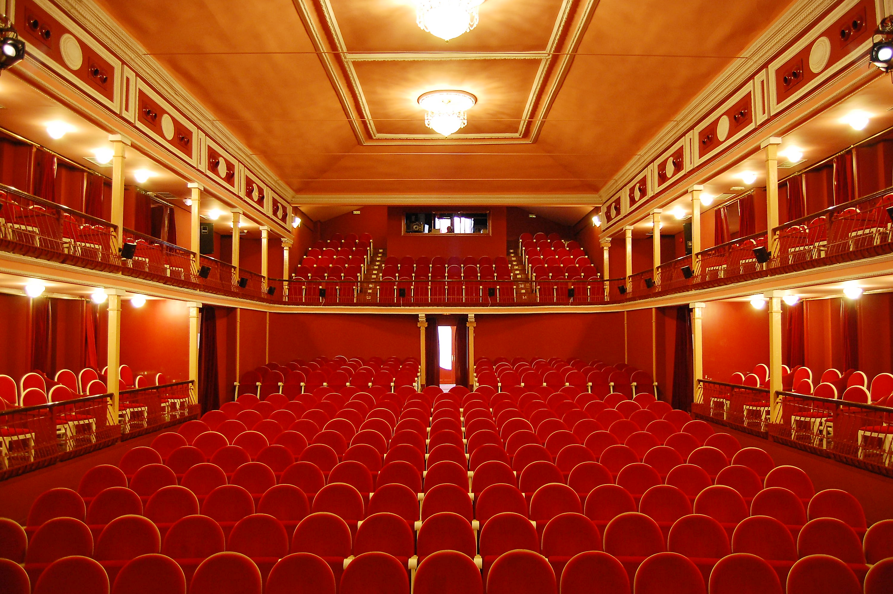 Patio de butacas y anfiteatro del Teatro Salón Cervantes de Alcalá de Henares (Comunidad de Madrid - España). Inaugurado el 31 de marzo de 1888. Es de estilo modernista y tiene un aforo para 458 espectadores.